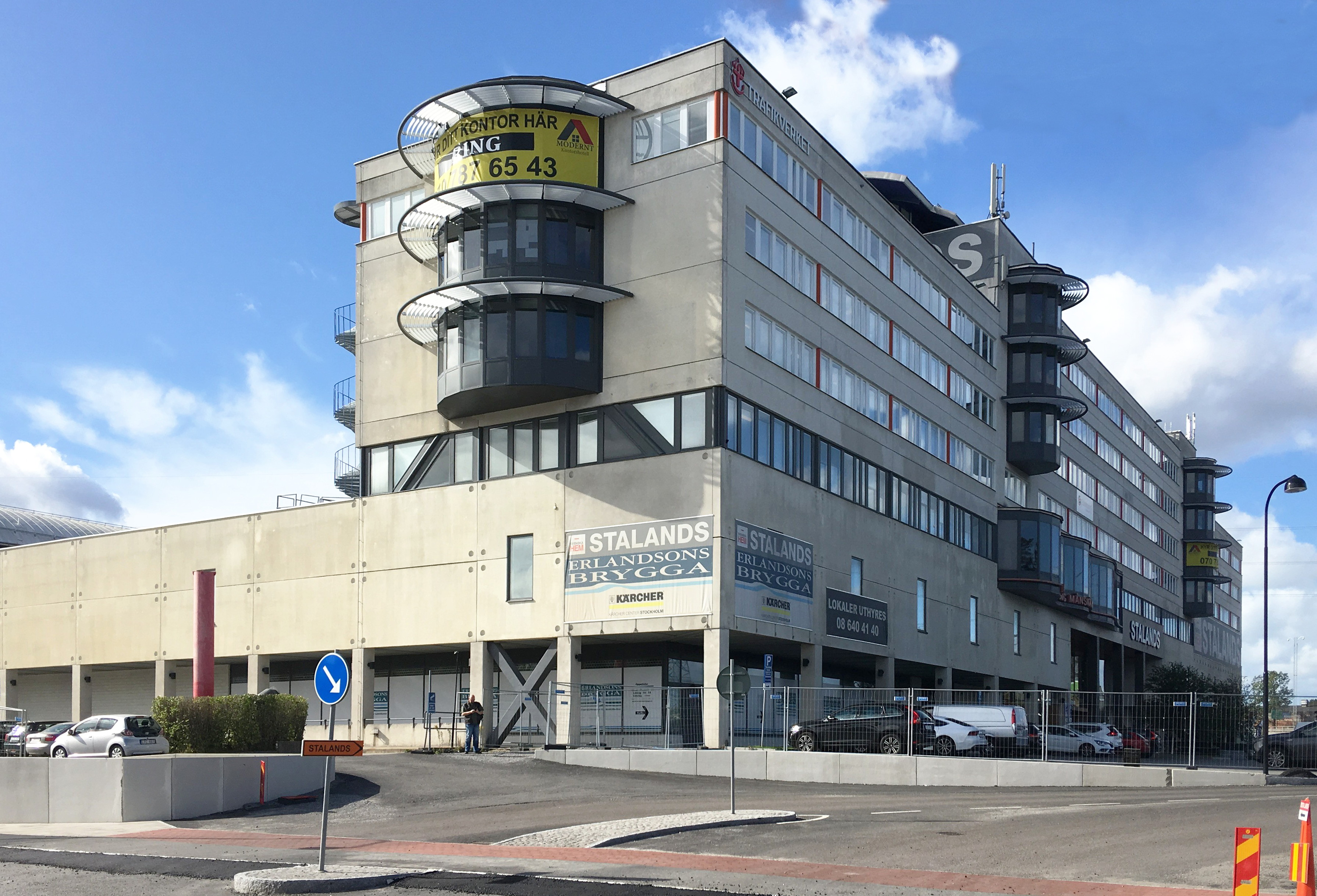 Sekanten, Kungens kurva, Huddinge, även kallad "Asko-huset", ritat 1991 av HJS Arkitektkontor.